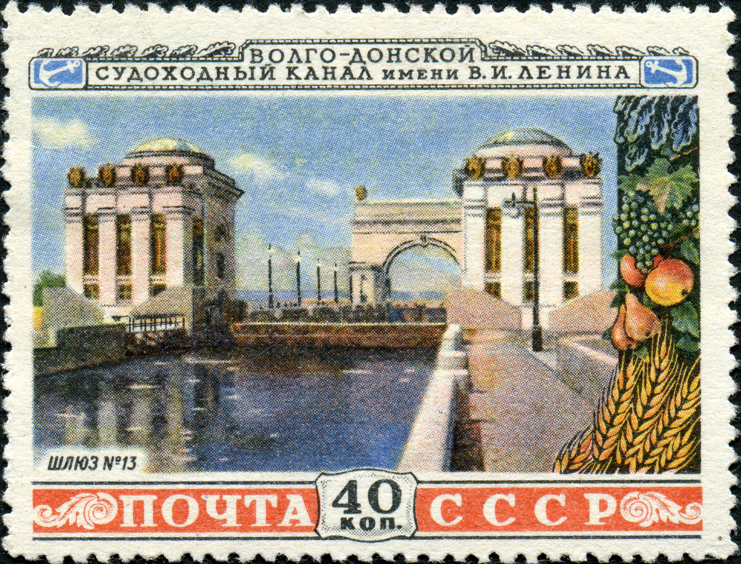 Марка СССР